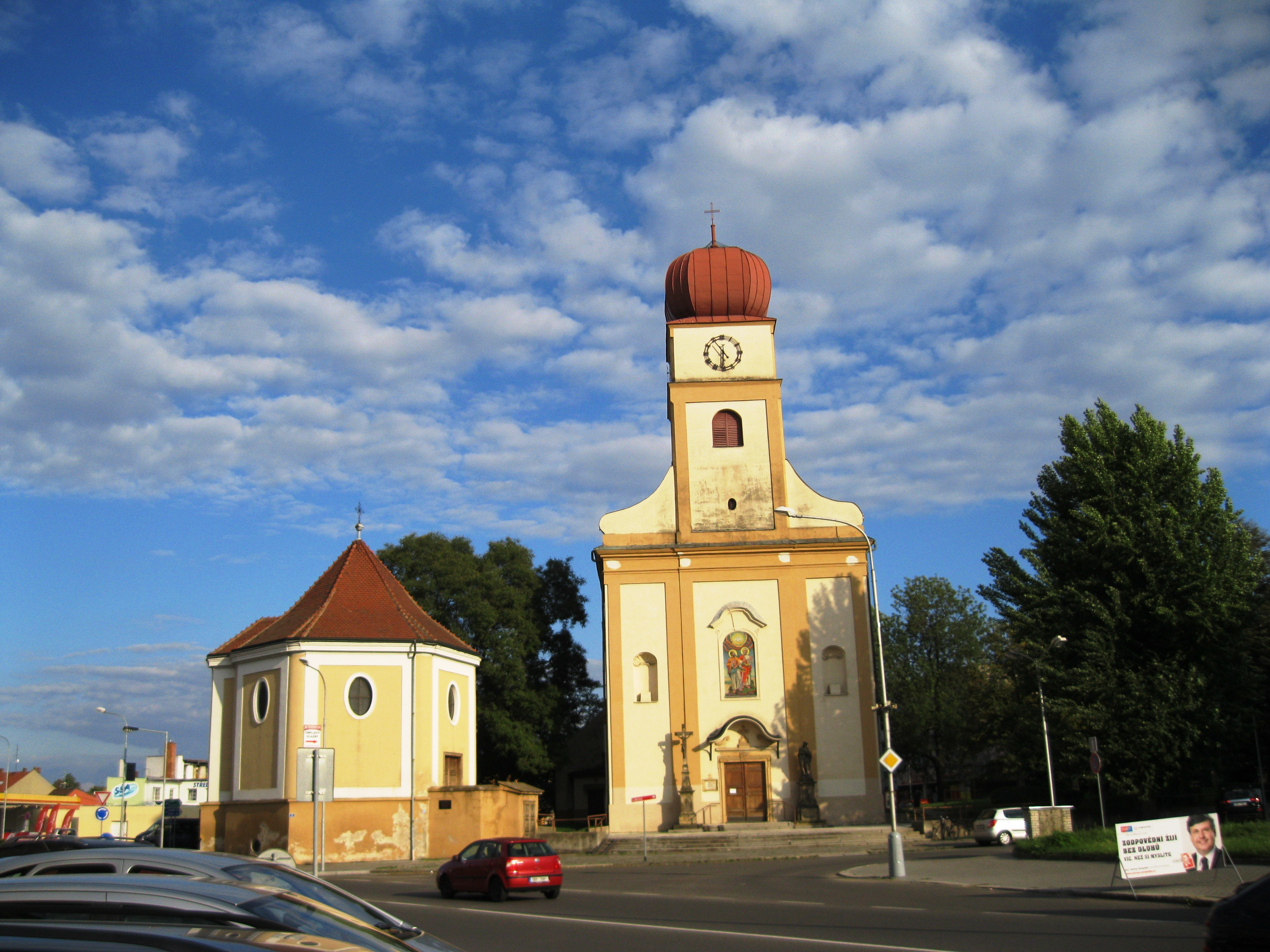 Kostel sv. Petra a Pavla (Prostějov), nám. Petrské, Prostějov